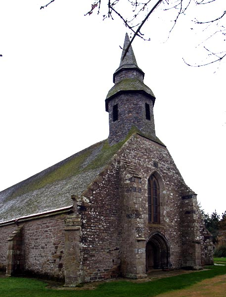 Chapelle Kermaria an Iskuit, commune de Plouha, Côtes-d'Armor (22), France. Façade ouest